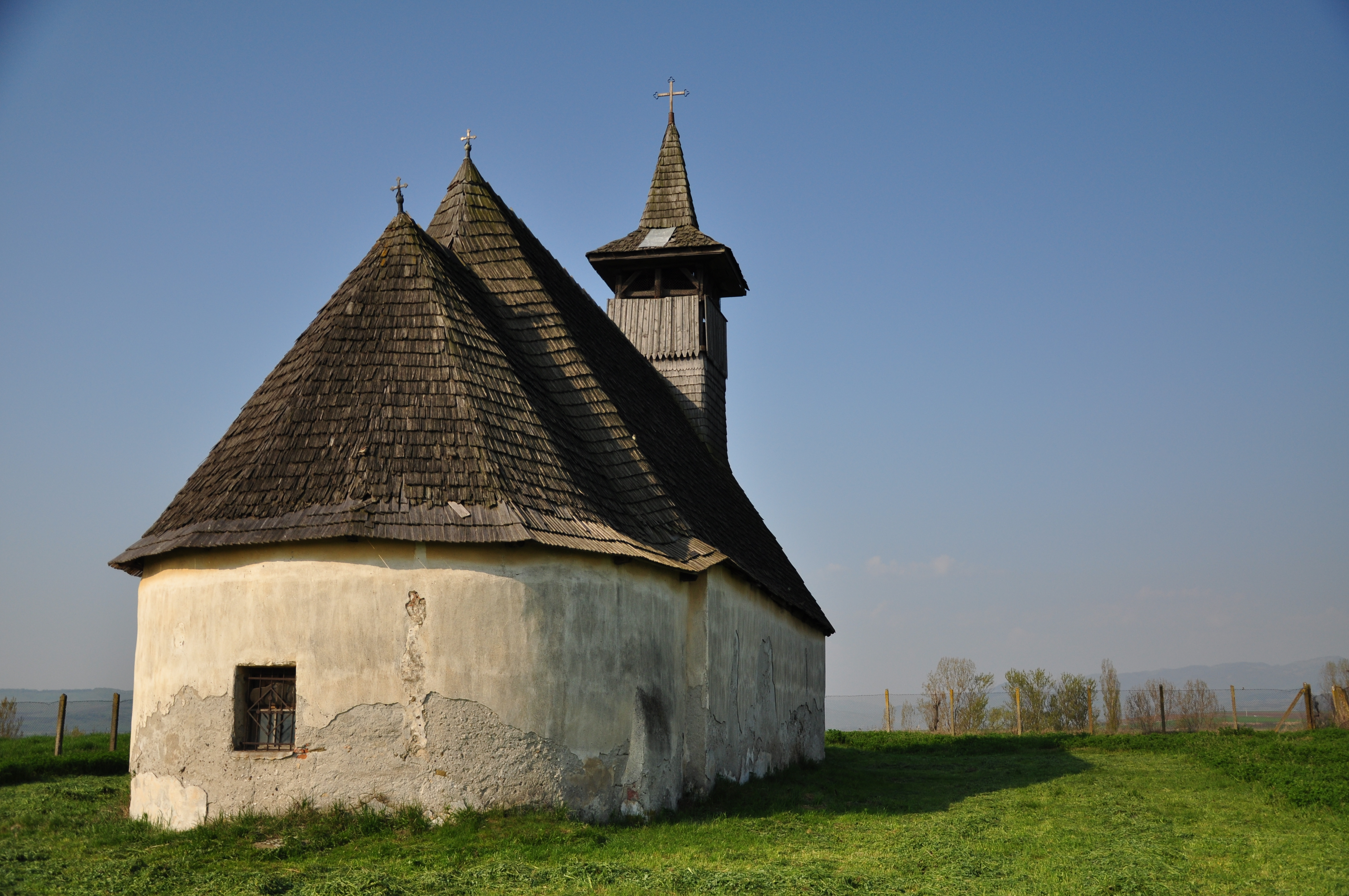 sec XV, cu ample modificări şi restaurări în 1715, cod LMI 2004 – AB-II-m-A-00219